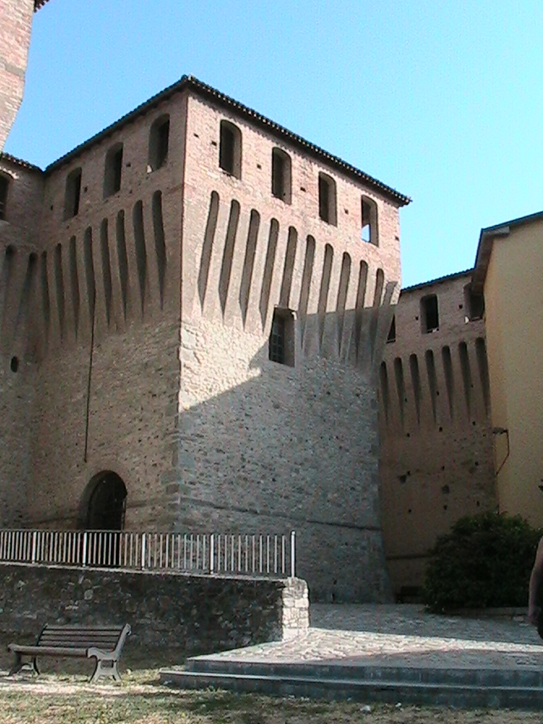 Varano de' Melegari - Castello Pallavicino